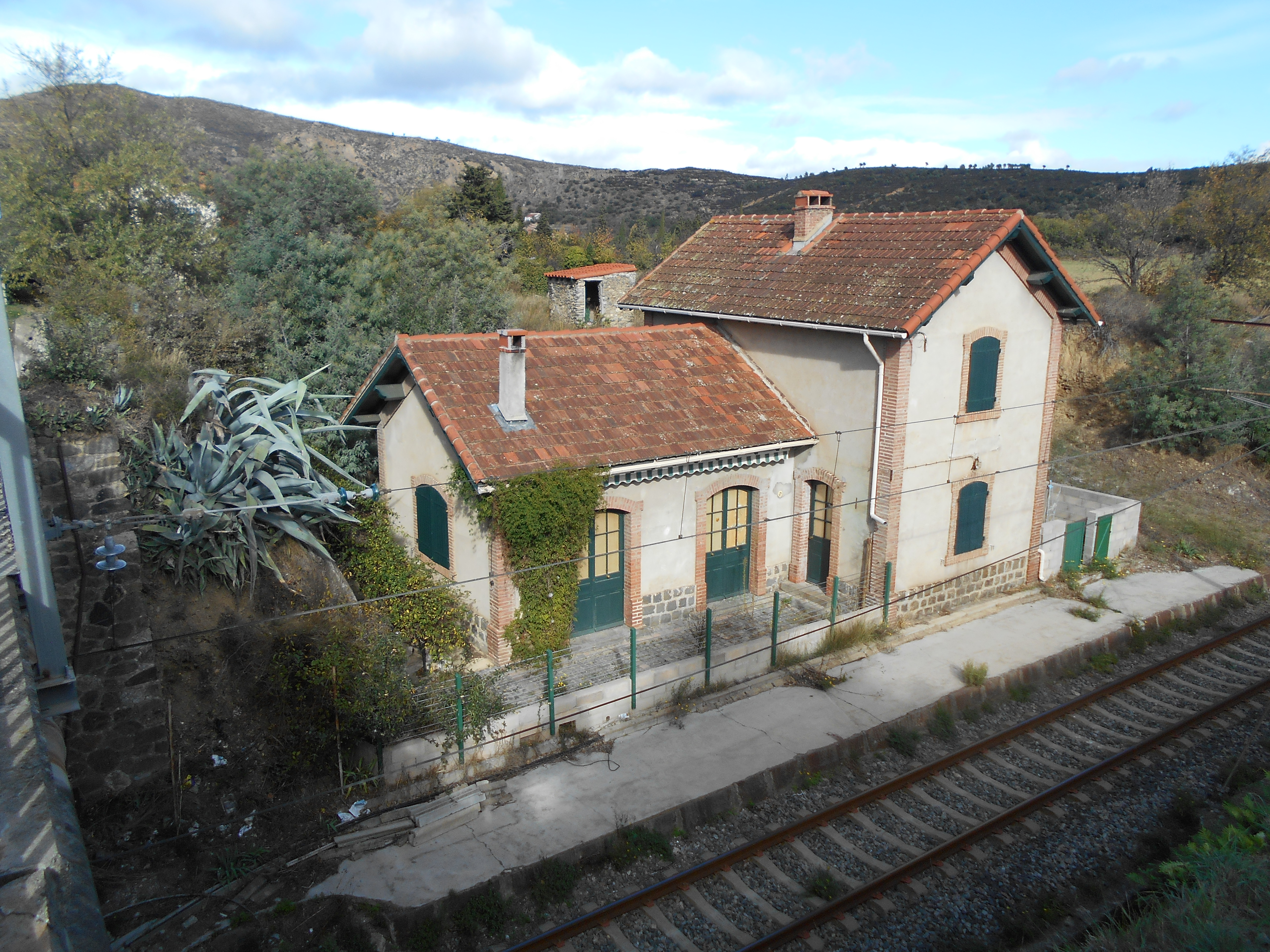 L'antiga estació de Rodès - Domanova